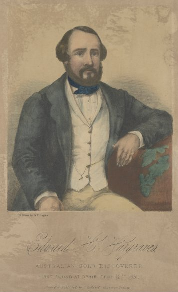 Der erste Entdecker australischer Goldfelder Edward Hammond Hargraves (1815-1891), Bild aus der Sammlung der australischen Nationalbibliothek